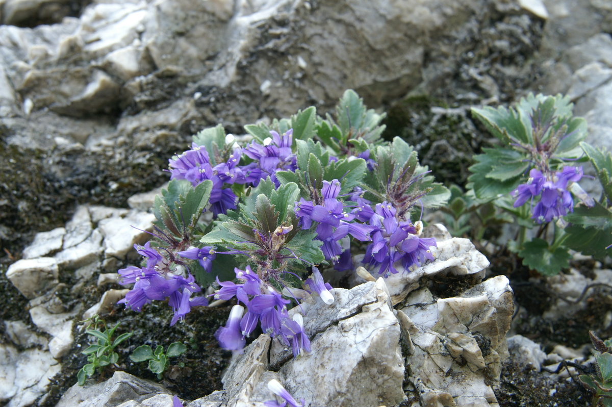 Modro milje na Mangrtskem sedlu.